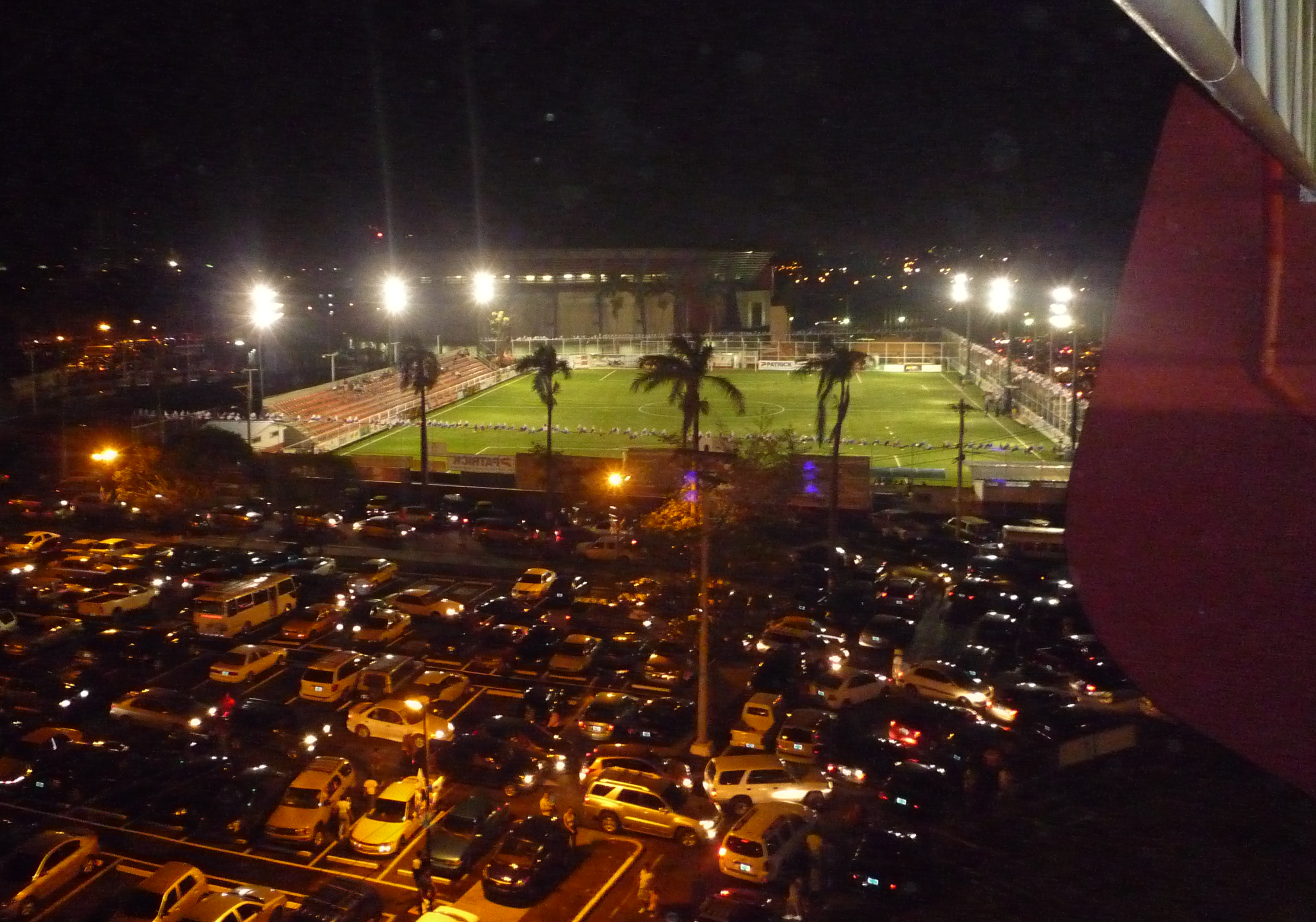 Vista aérea del Mini Rommel o Romelin, ciudad de Panamá, Panamá.